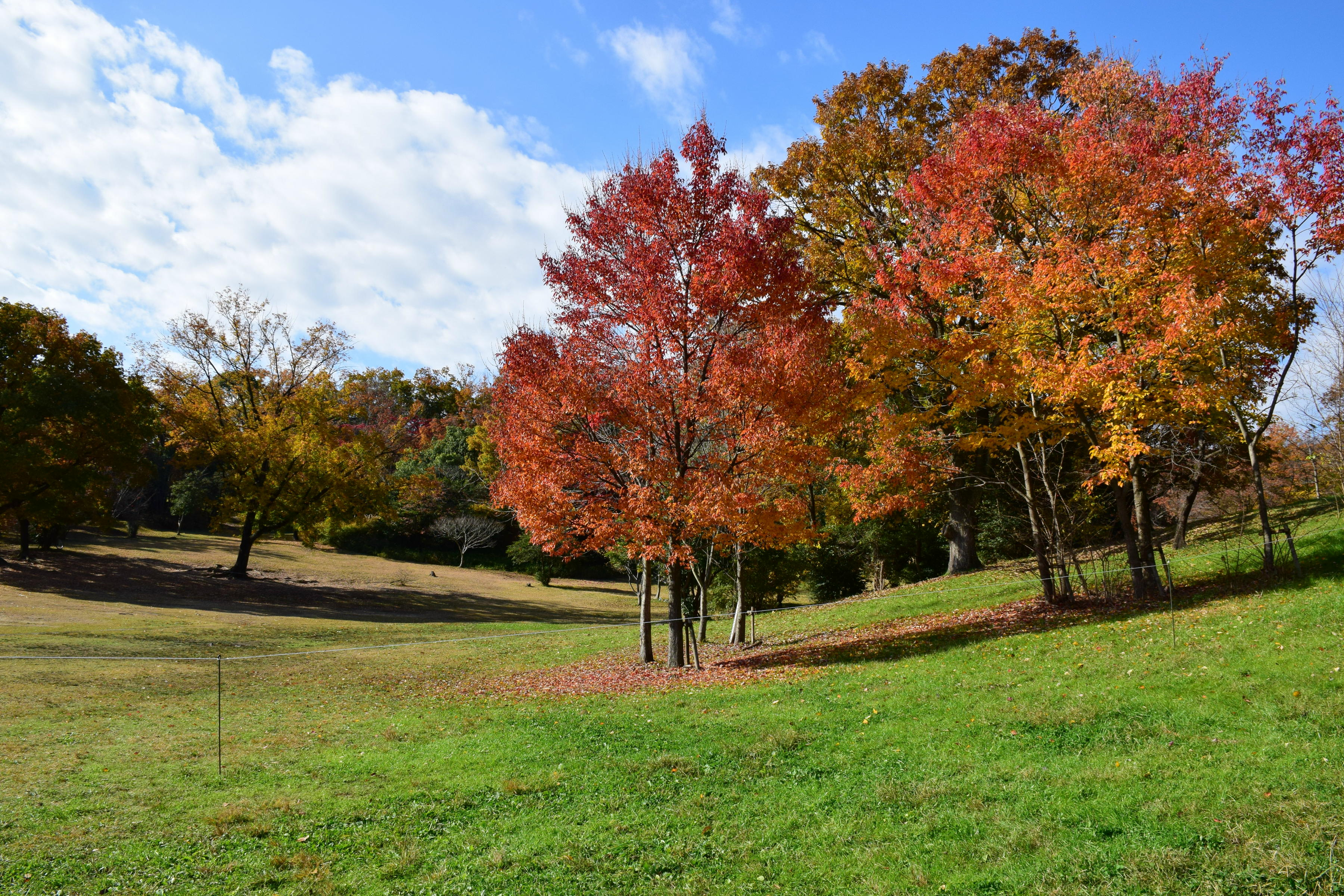 大高緑地公園